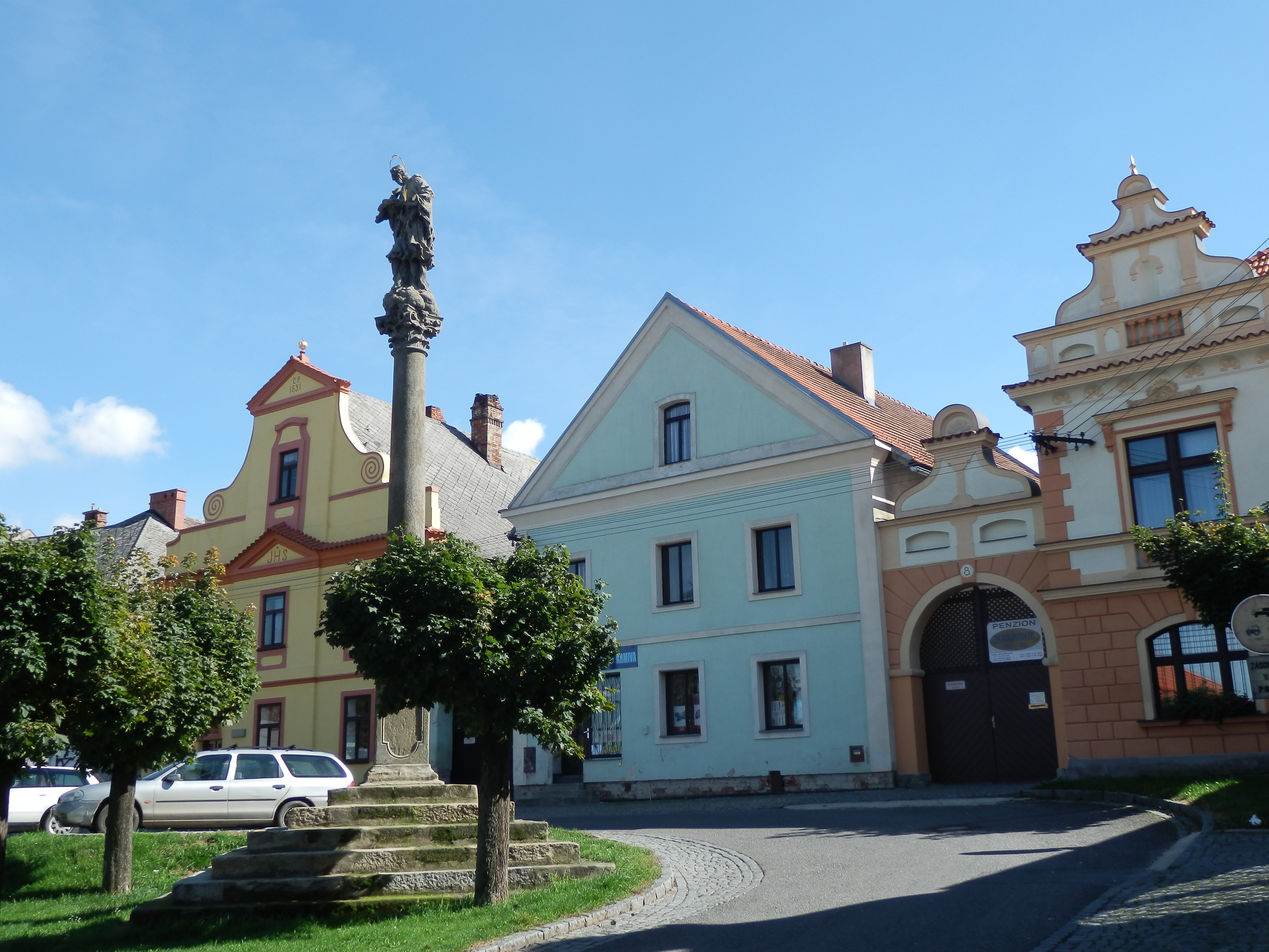 Měšťanský dům (Luže), Luže 8